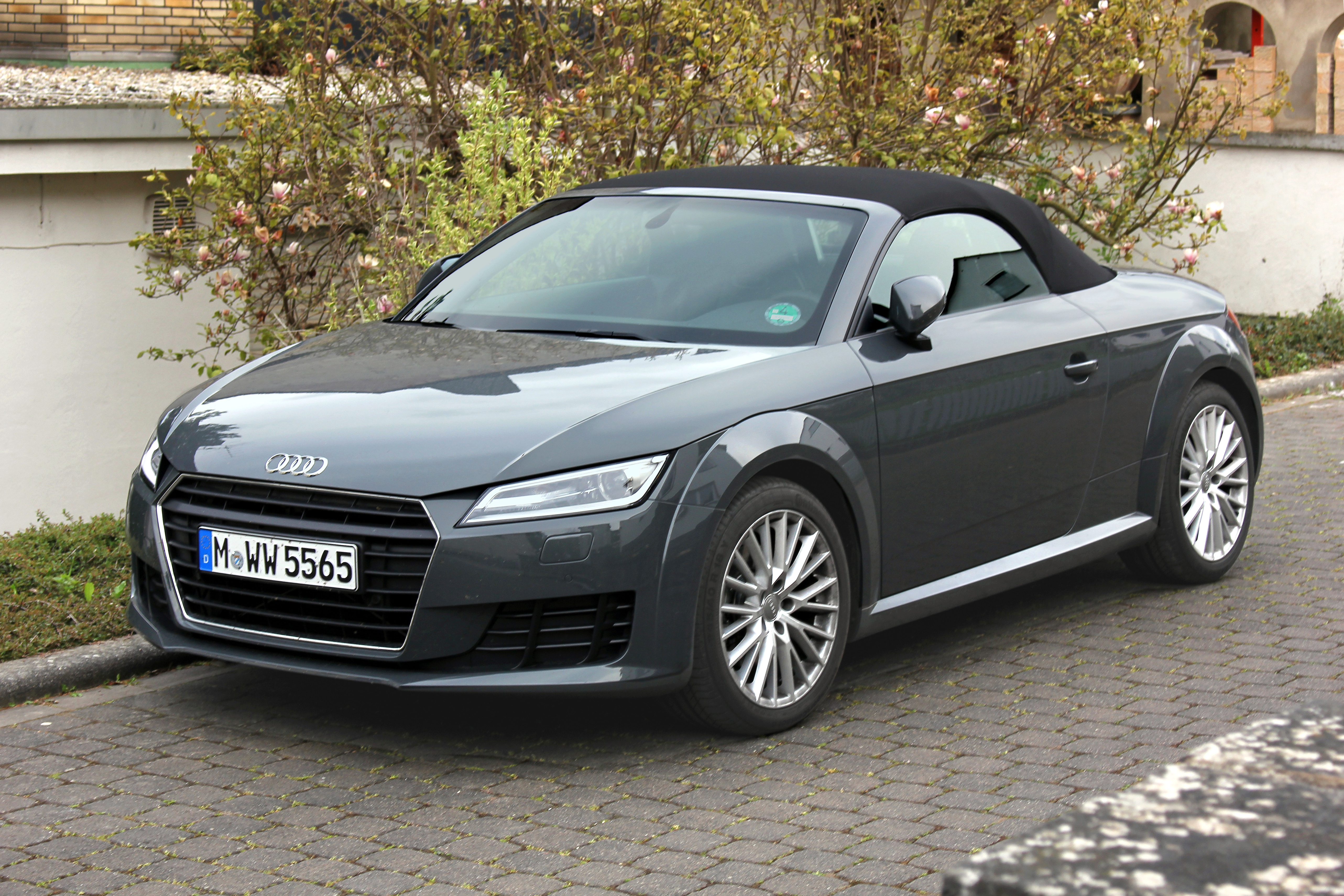 Audi TT Roadster, 1,8 Liter Hubraum, Erstzulasung März 2017 (Kennzeichen verändert)